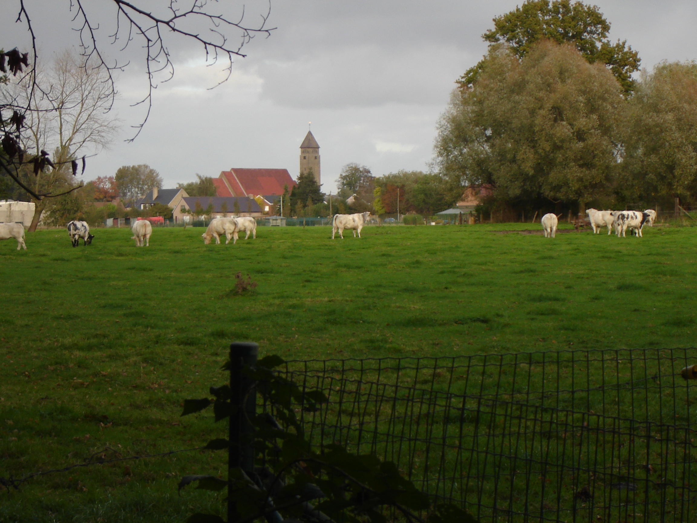 Hamlet 't Veld in Meulebeke, West-Flanders, Belgium. Picture taken from provincial domain 't Veld in Ardooie